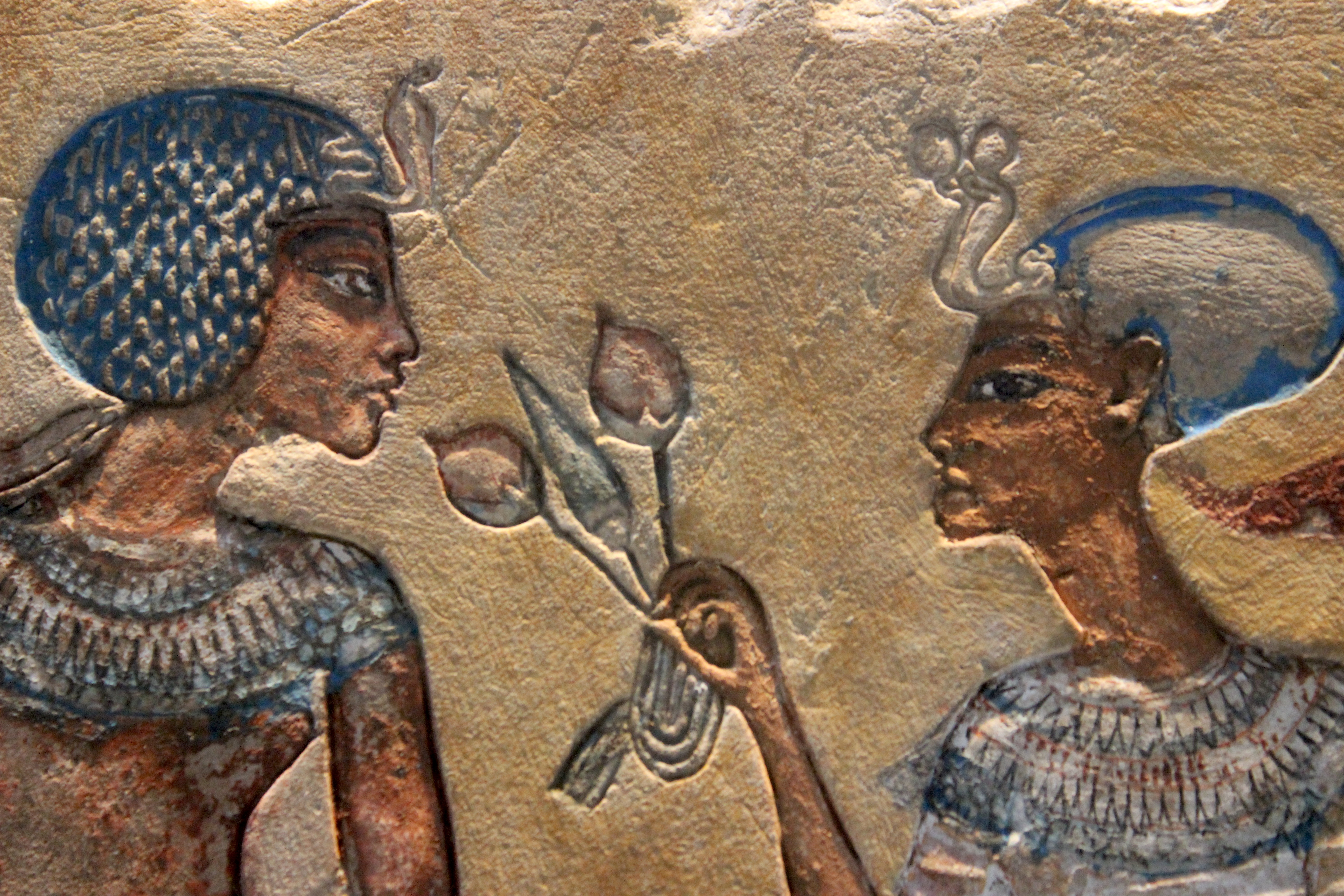 Berlín, Neues Museum. Pareja en el jardín, arte de Amarna.